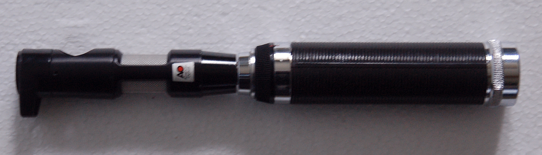 AO Retinoscope intrument för att utföra en objektiv refraktionsbestämning